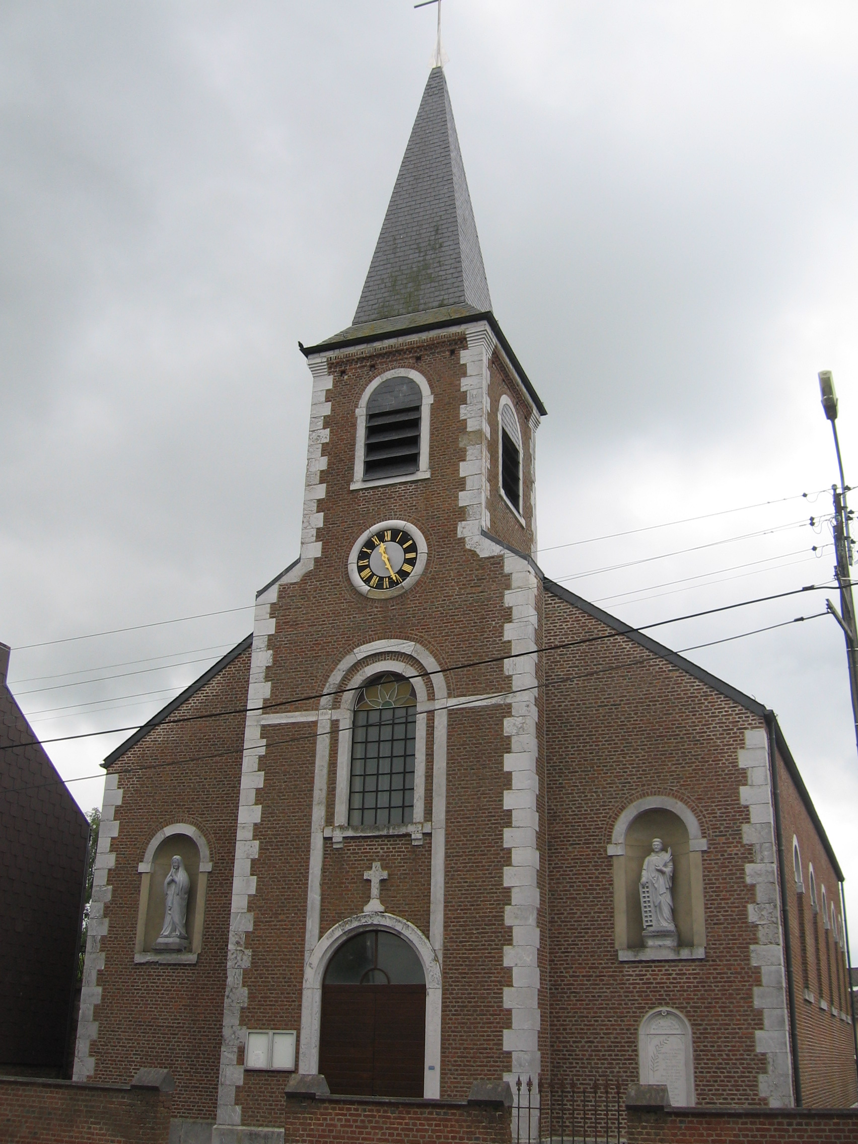 L'église Saint-Laurent, à Sart-Saint-Laurent, dans l'Entre-Sambre-et-Meuse (Belgique)